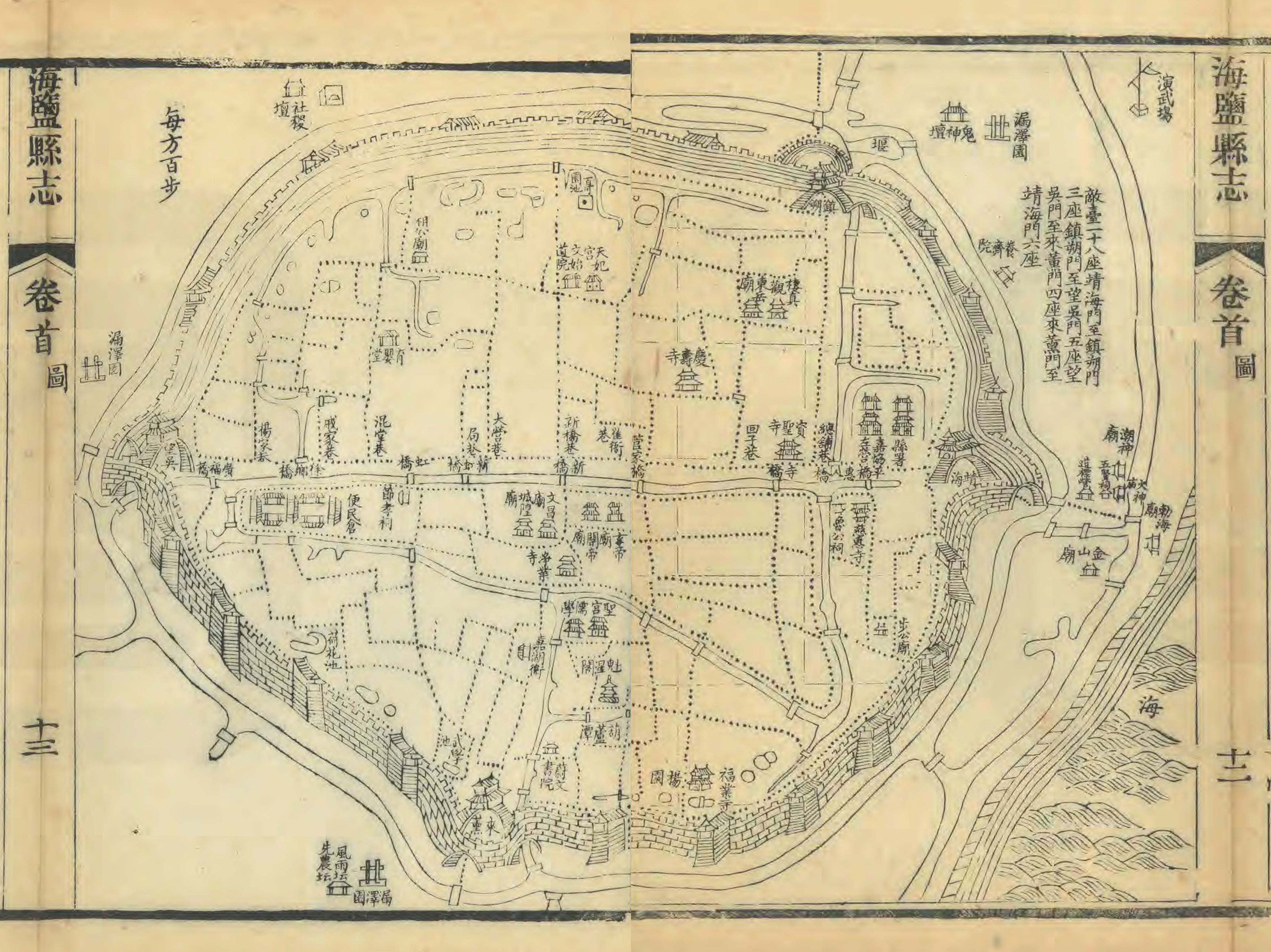 清光绪三年（1877）《光绪海盐县志》县城图。